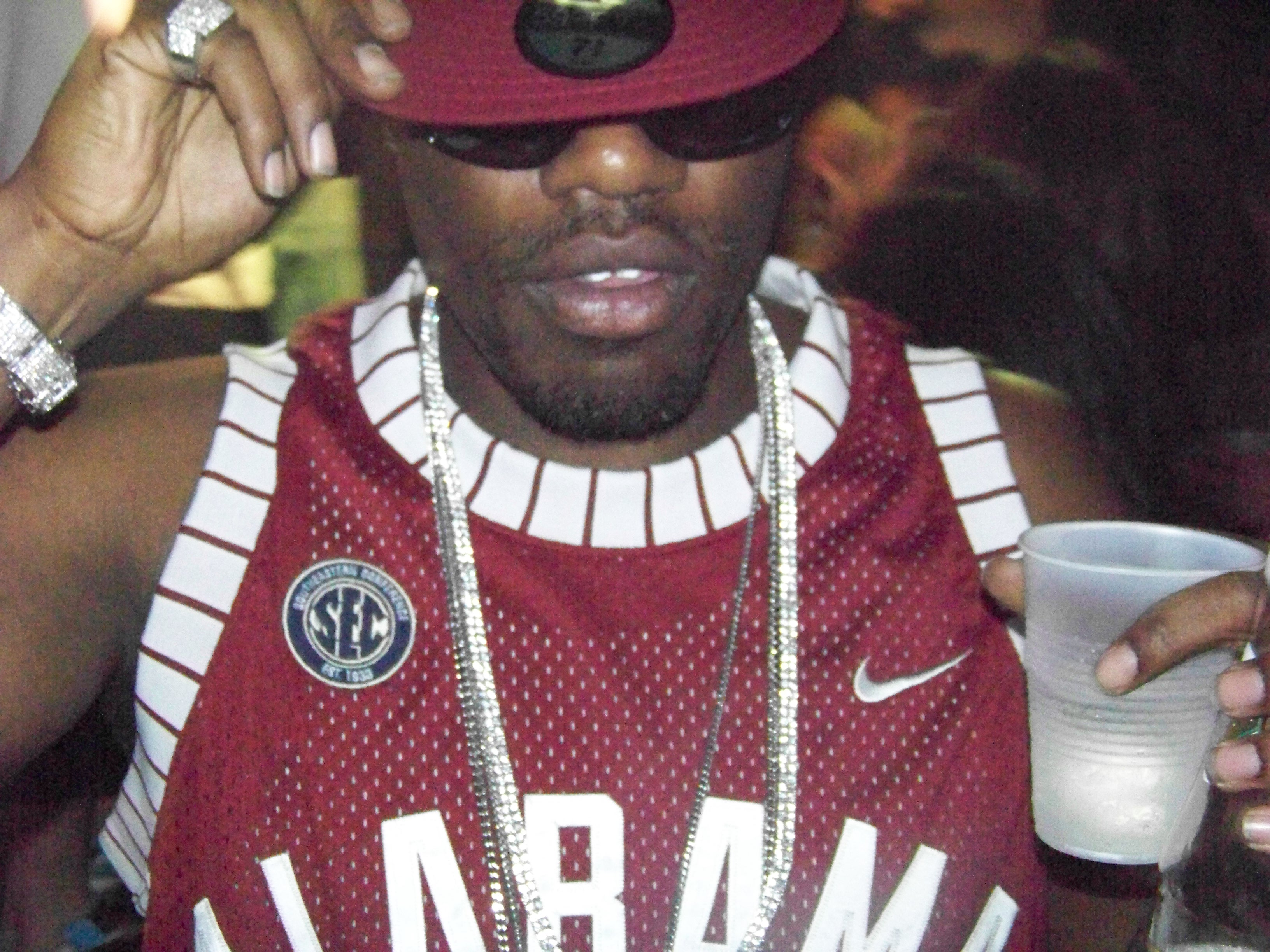 Rapper Attitude in Atlanta, Georgia.